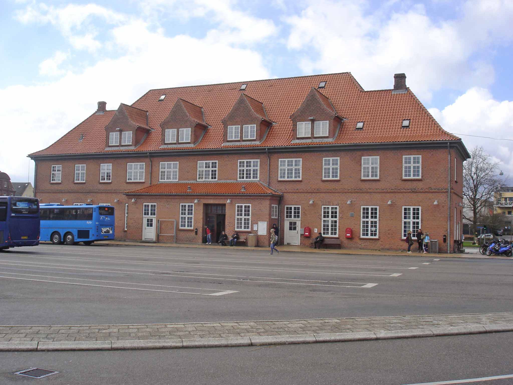 Sønderborg By Station fra sporsiden